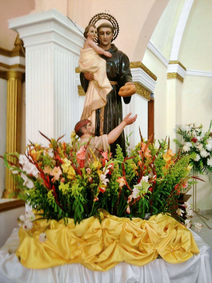 Se dice que esta imagen la compraron para sustituir la imagen mas pequeña de San Antonio de Padua que esta anteriormente pero el dia de la fiesta, llovio mucho sobre la poblacion y desde entonces se entendio que habia que sacar las dos imaganes para que no volviera a llover.